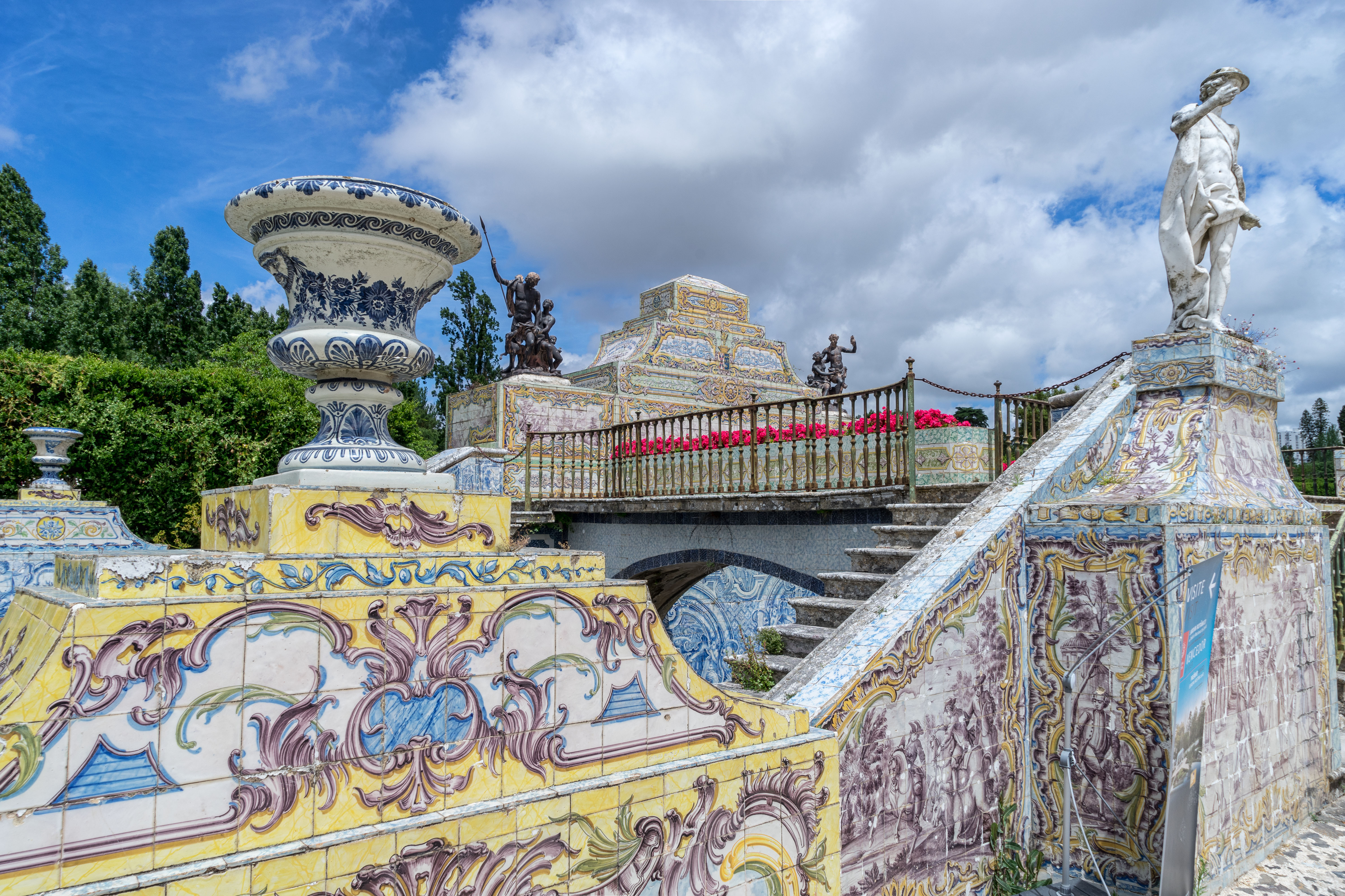 Palais Royal de Queluz - Canal